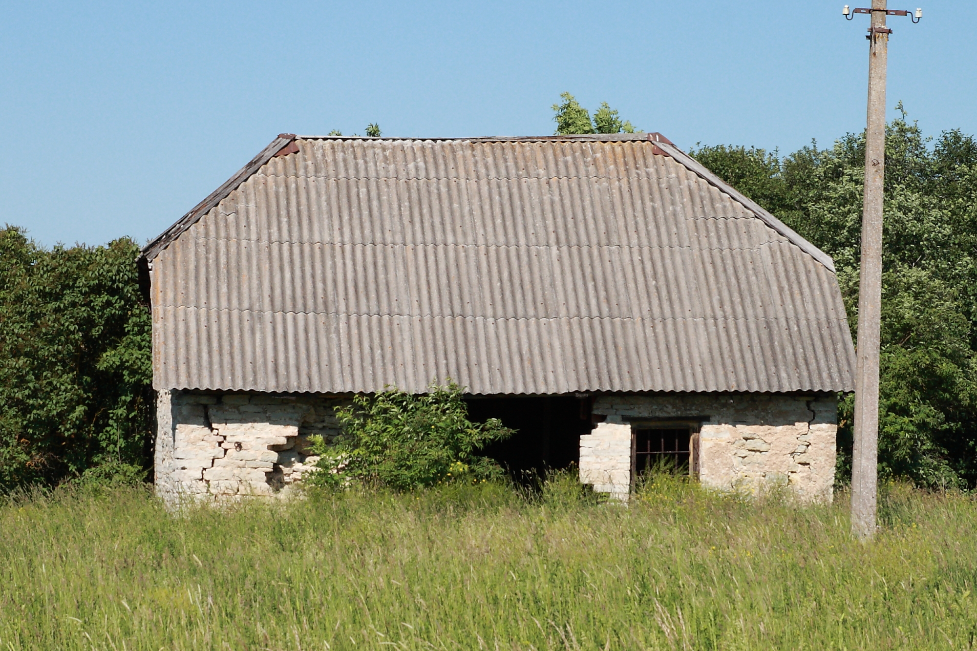 Lehola mõisa sepikoda, 19.saj